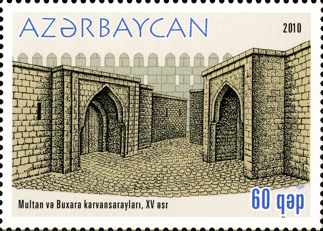 İçəri şəhər